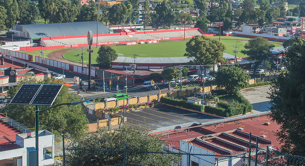 Estadio Tlahuicole desde el Mirador de la Ciudad de Tlaxcala